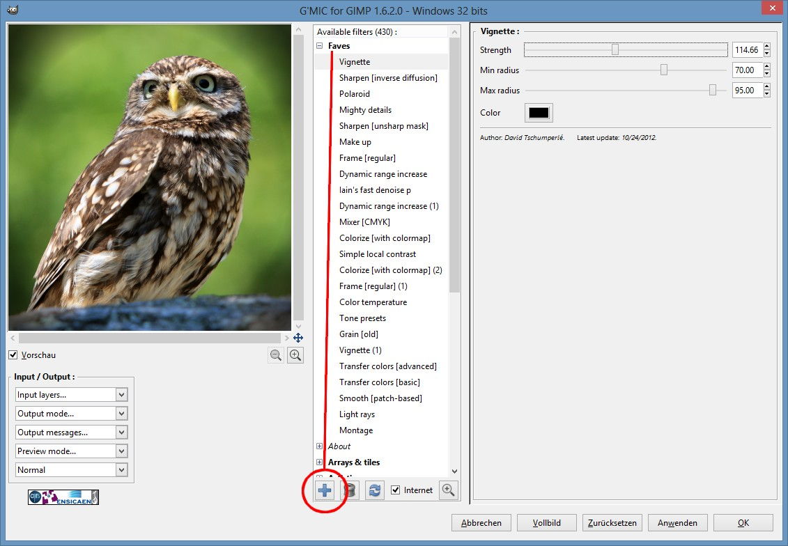 Gmic Faves